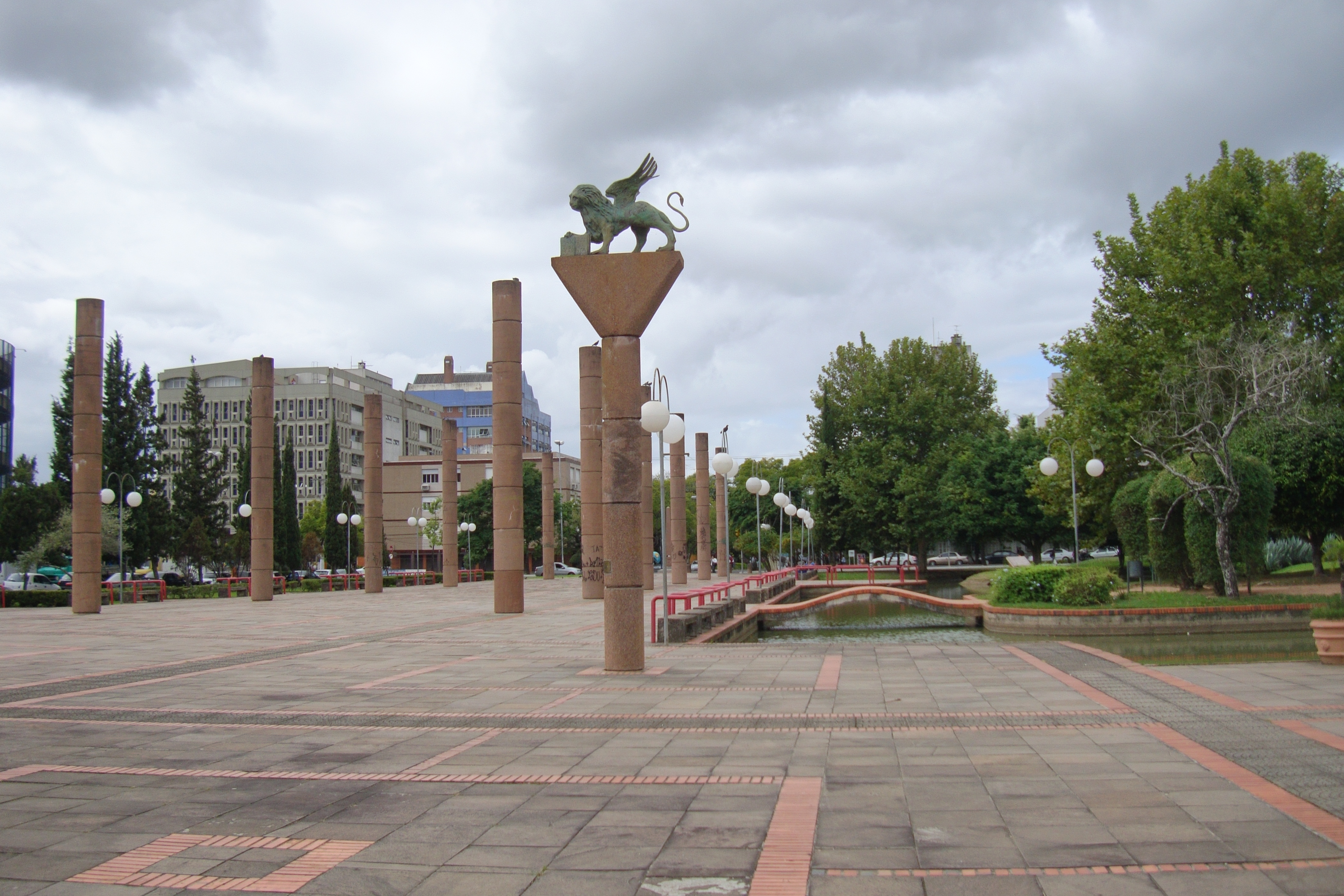 Leão de São Marcos na Praça Itália em Porto Alegre